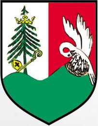 Herb gminy Jodłowa